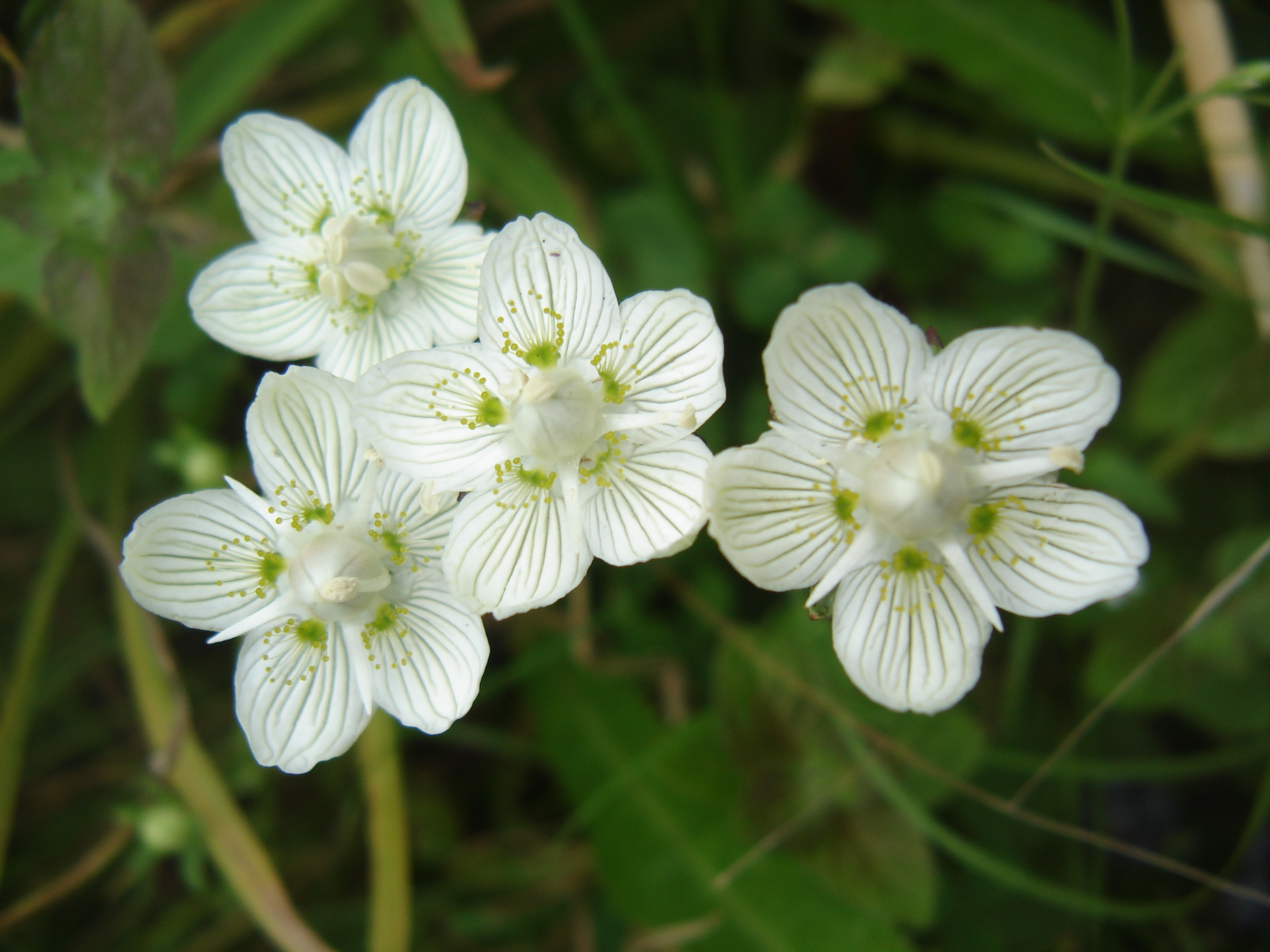 Parnassia (Parnassia palustris), Noordduinen Katwijk aan Zee